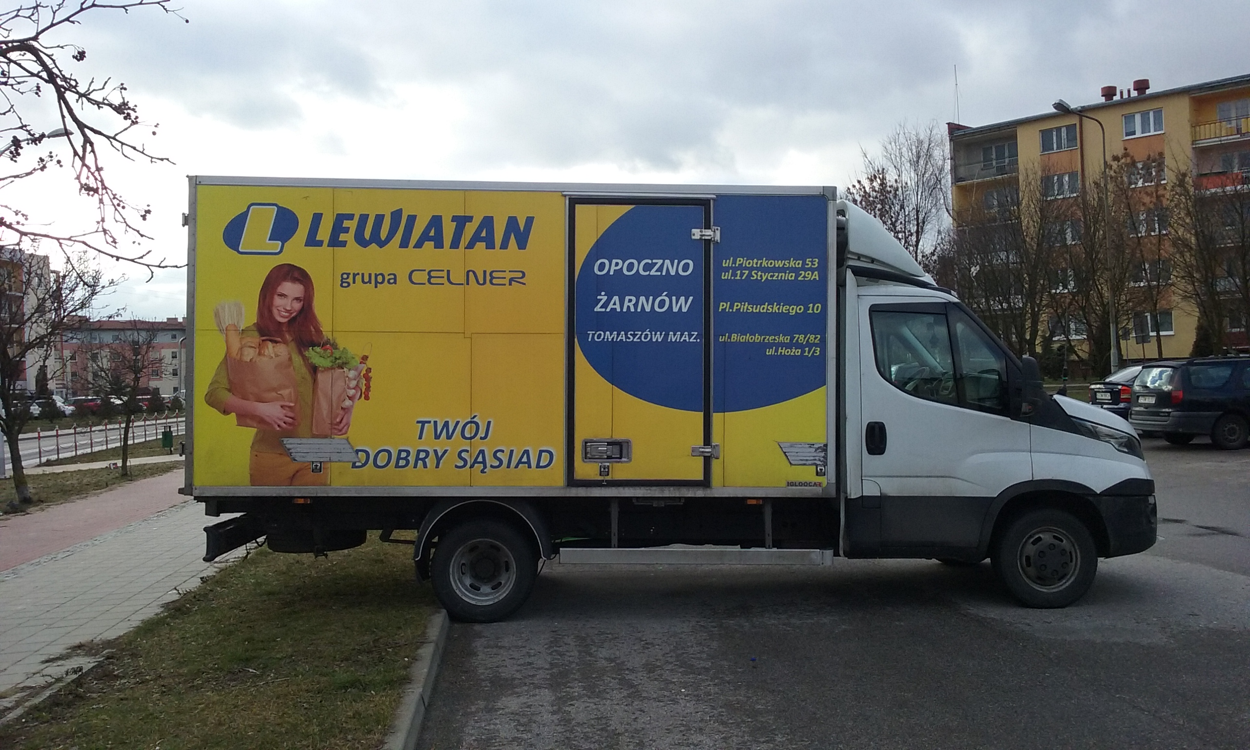 Samochód dostawczy polskiej sieci dyskontów spożywczych Lewiatan. Tomaszów Mazowiecki